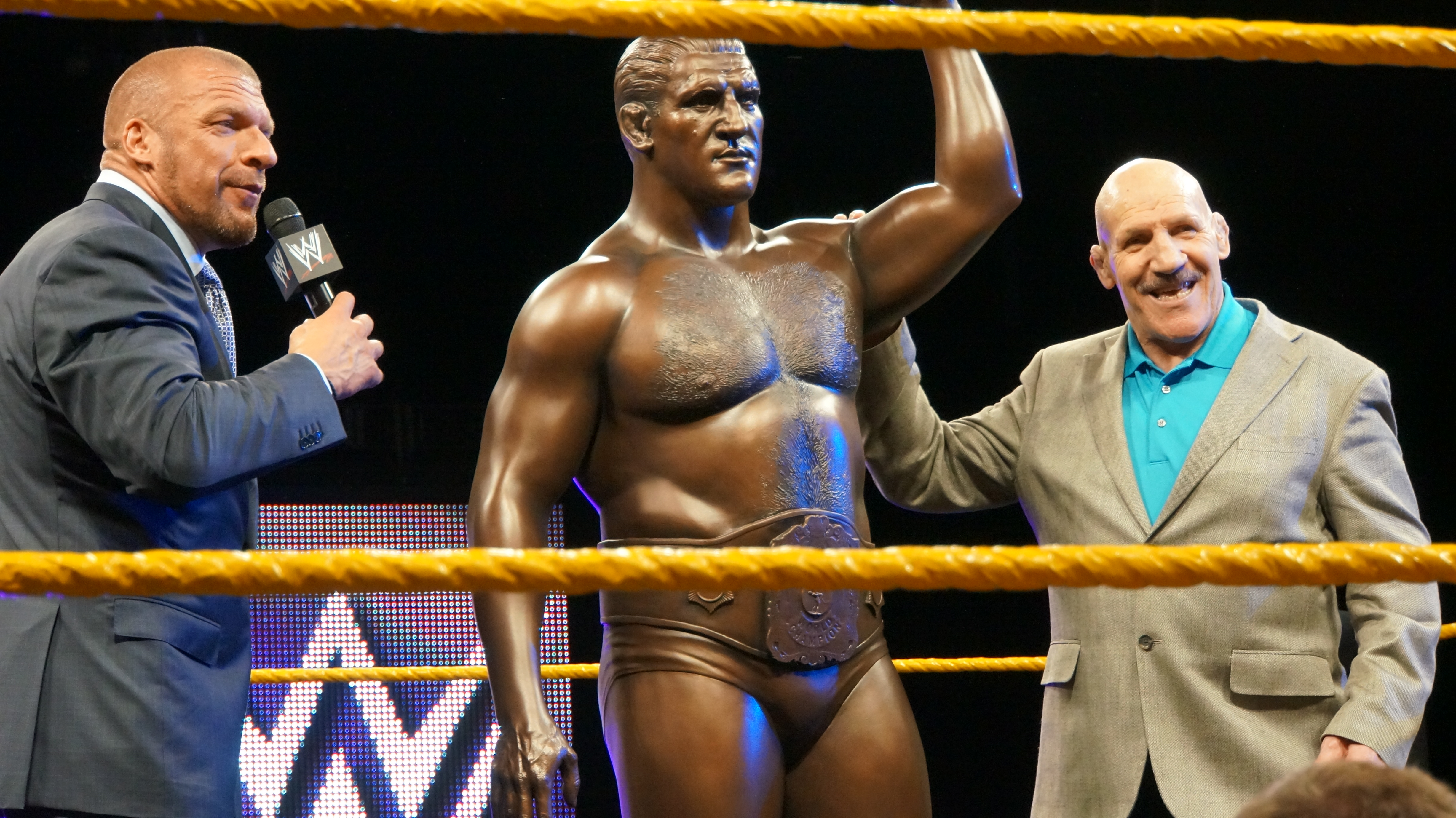 2014-04-03_19-31-51_NEX-6_DSC05984